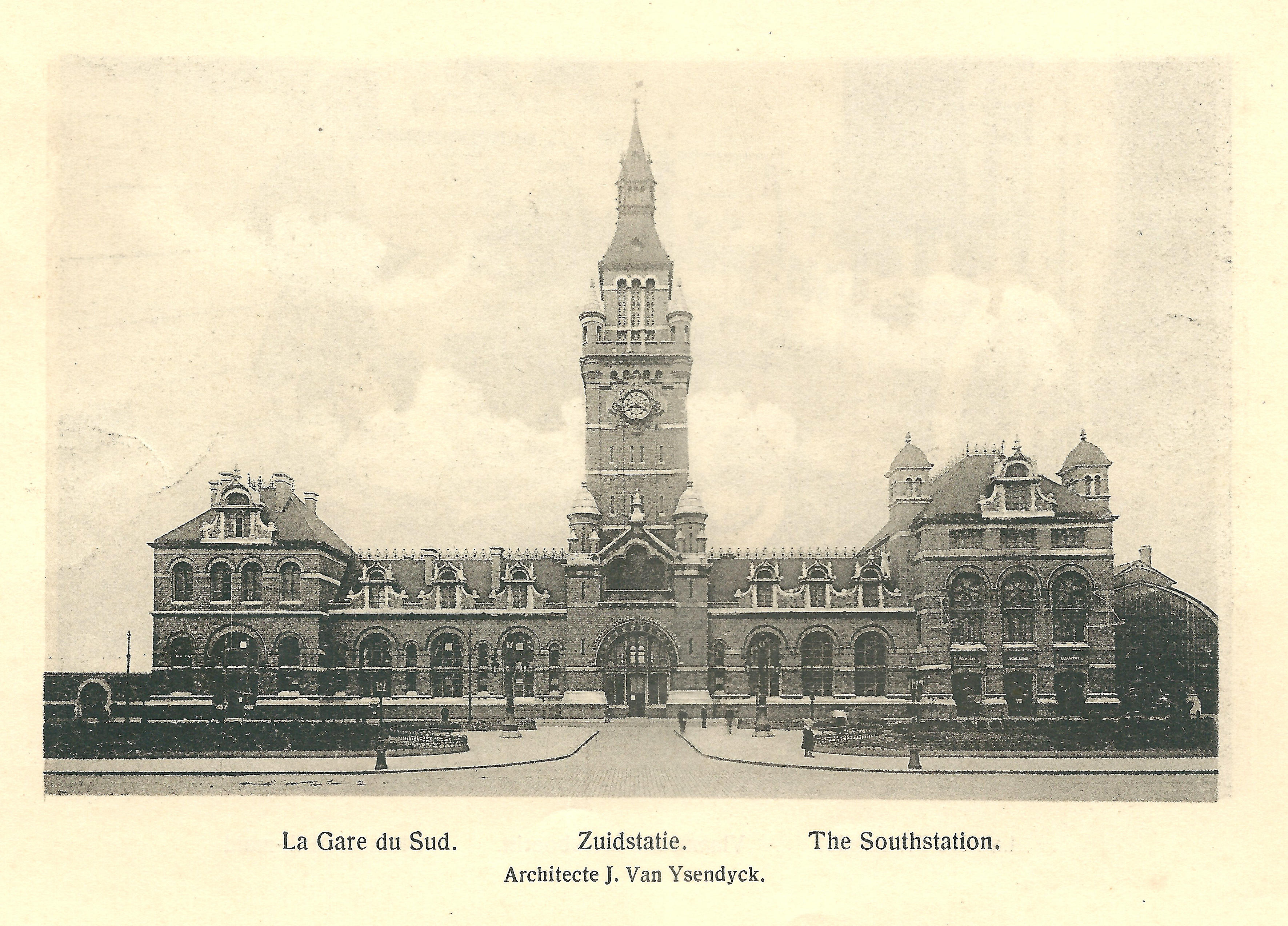 photographie légendée d'Anvers avant 1920 : La Gare du Sud